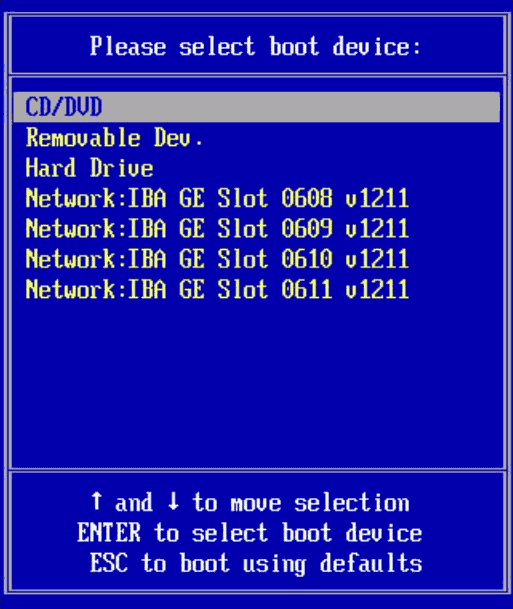 Menu rozruchowe BIOS